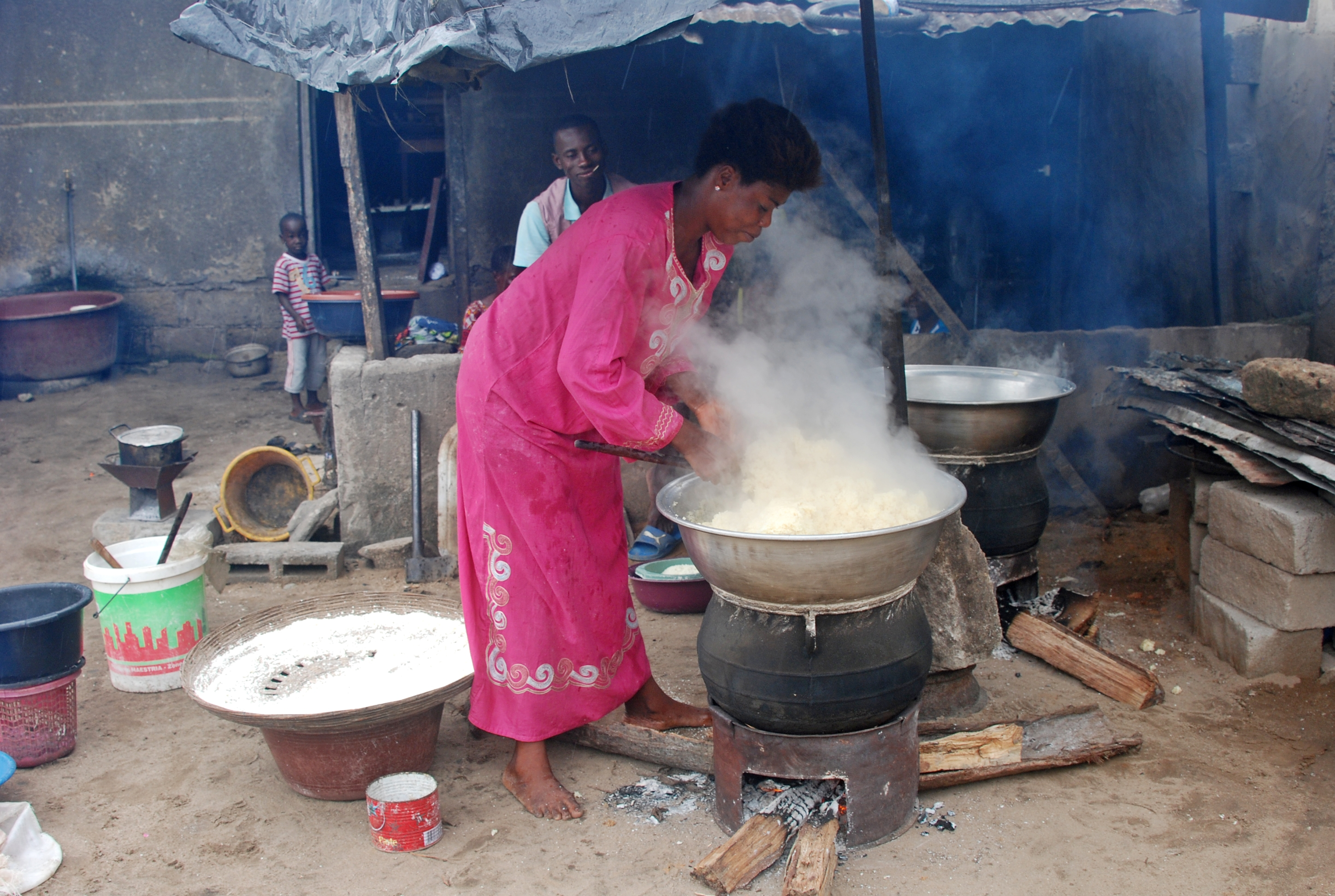 femme préparant de l'attiéké à Abidjan This is an image of "African people at work" from Ivory Coast